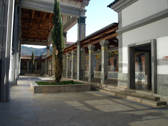 Interior da Cripta de S. Bento da Porta Aberta, Rio Caldo – Terras de Bouro